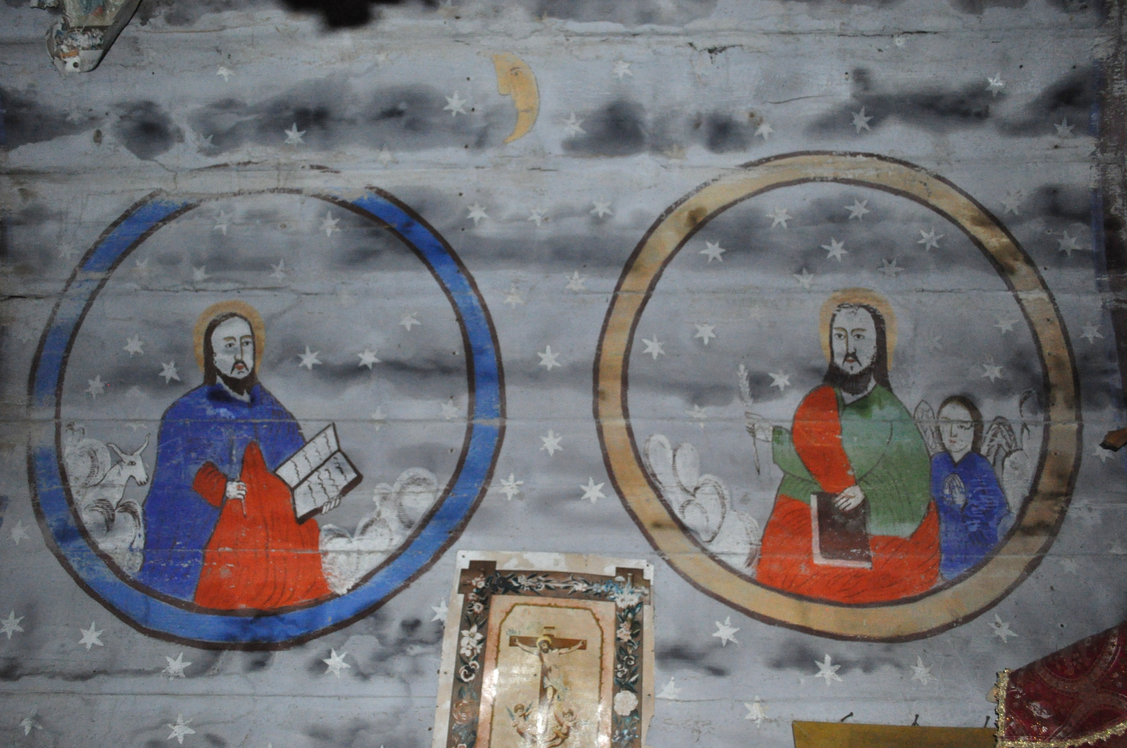 Biserica de lemn "Sfinții Împăraţi" din Aspra